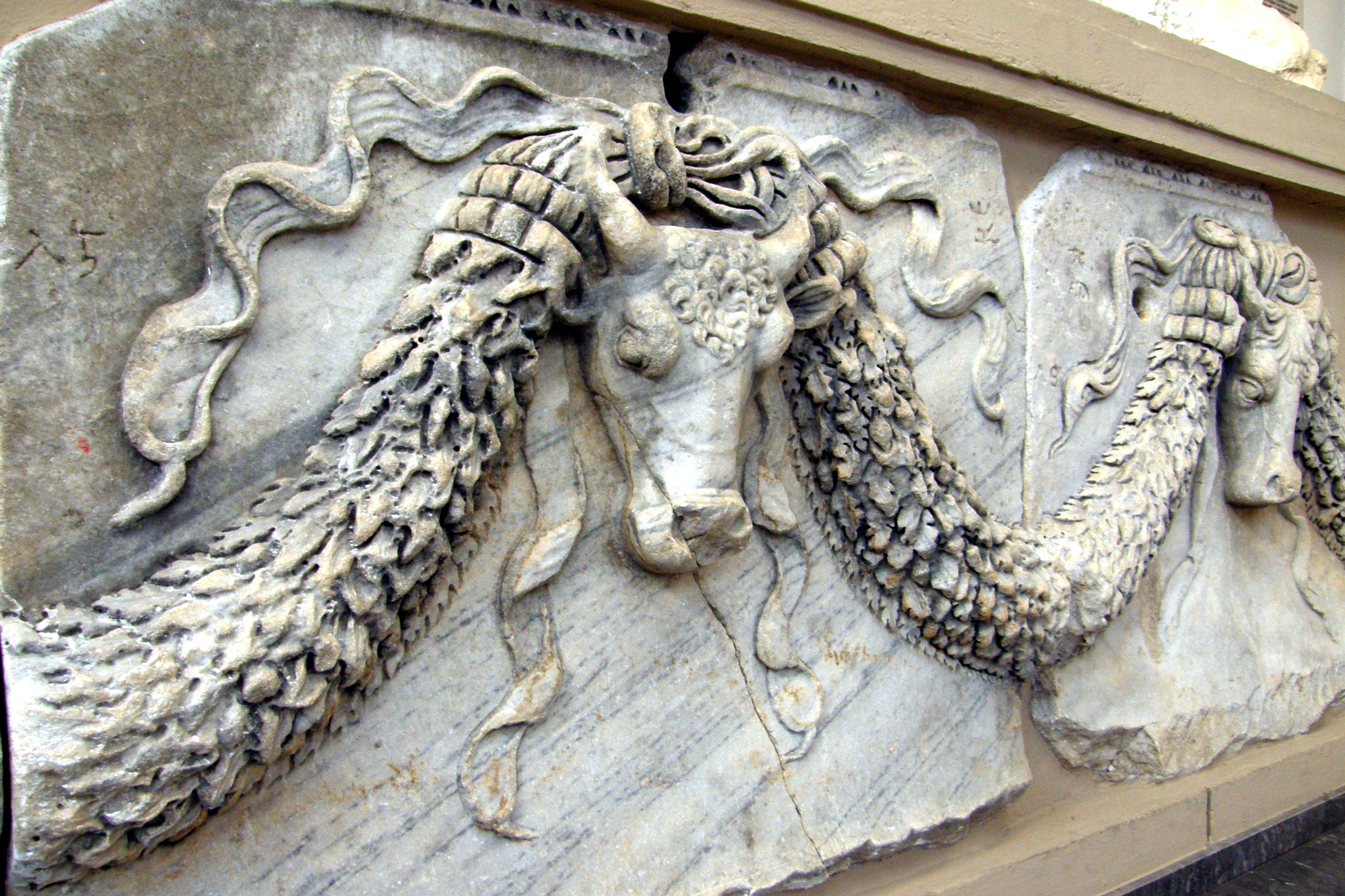 Frise à têtes de taureaux (détails), musée d'Éphèse, Selçuk, Turquie.